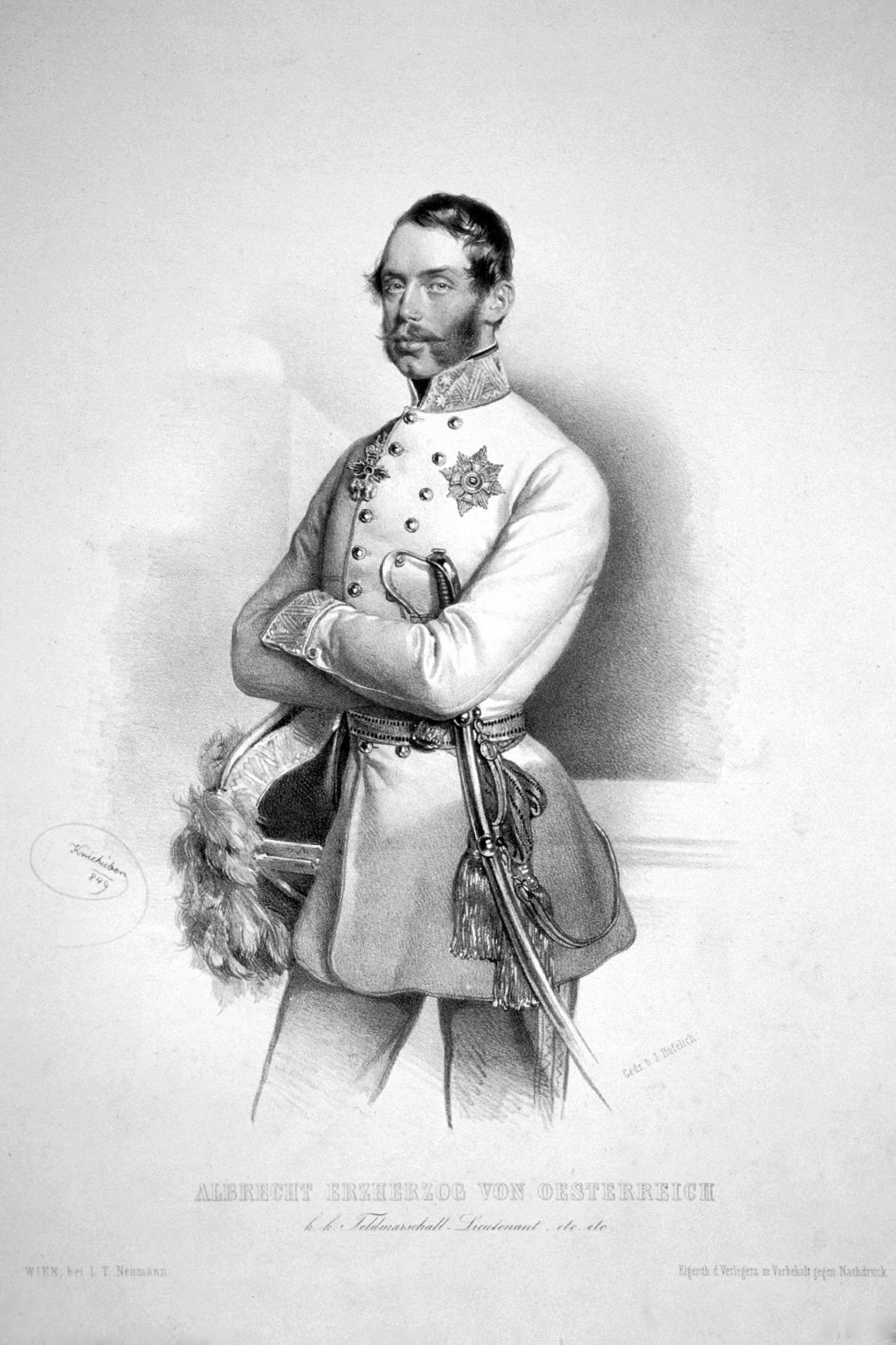 Albrecht von Österreich-Teschen (1817-1895), k. u. k. Feldmarschall